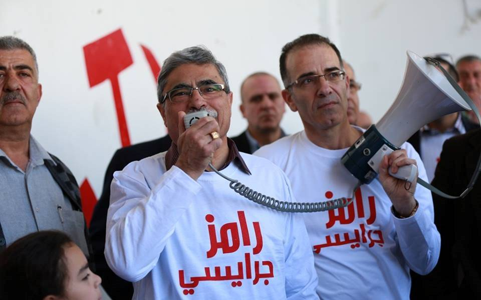 ראמז גראיסי בבחירות לראשות העיריה